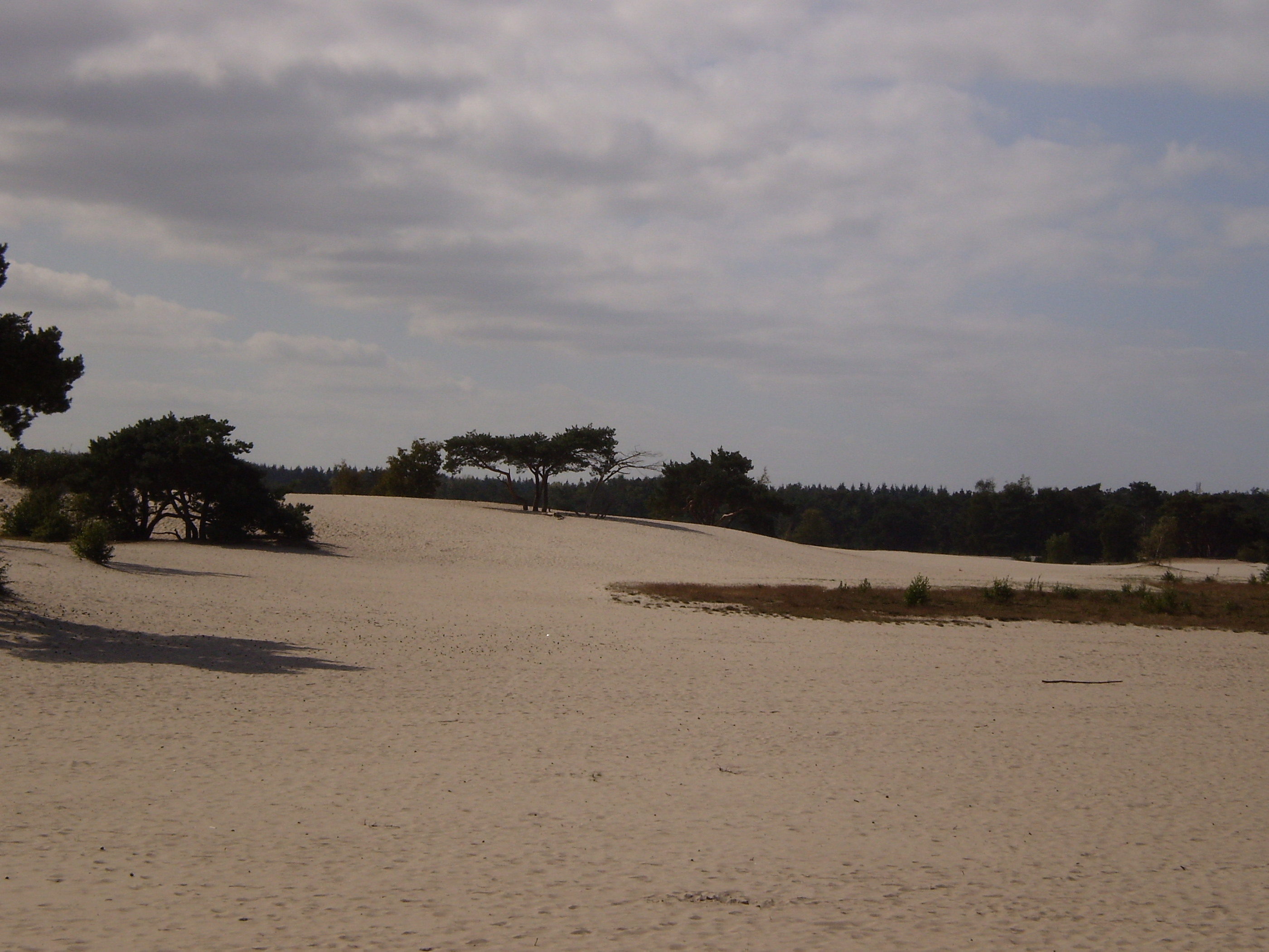 Lange Duinen (Soester Duinen)